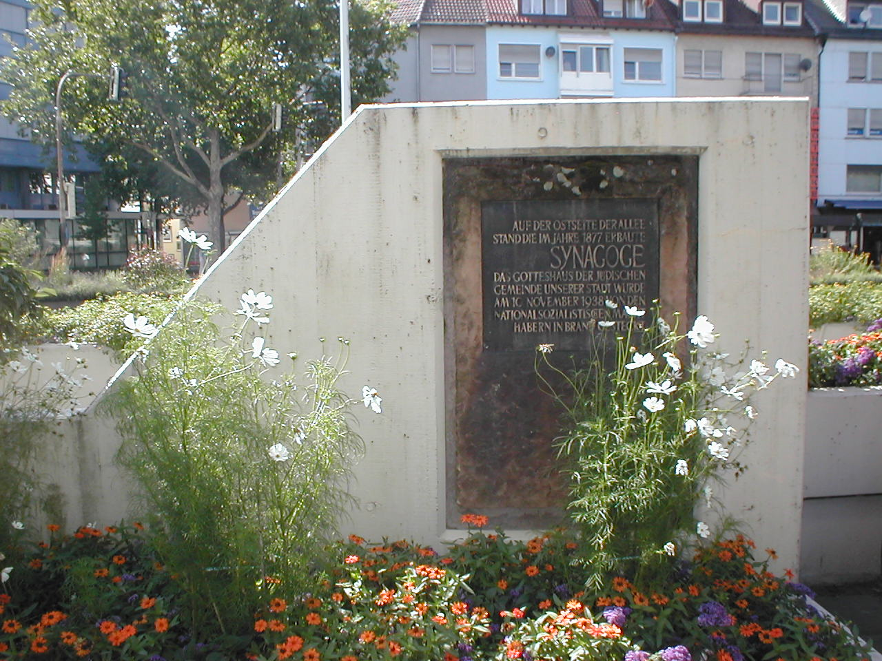 Synagogen-Gedenkstein in Heilbronn